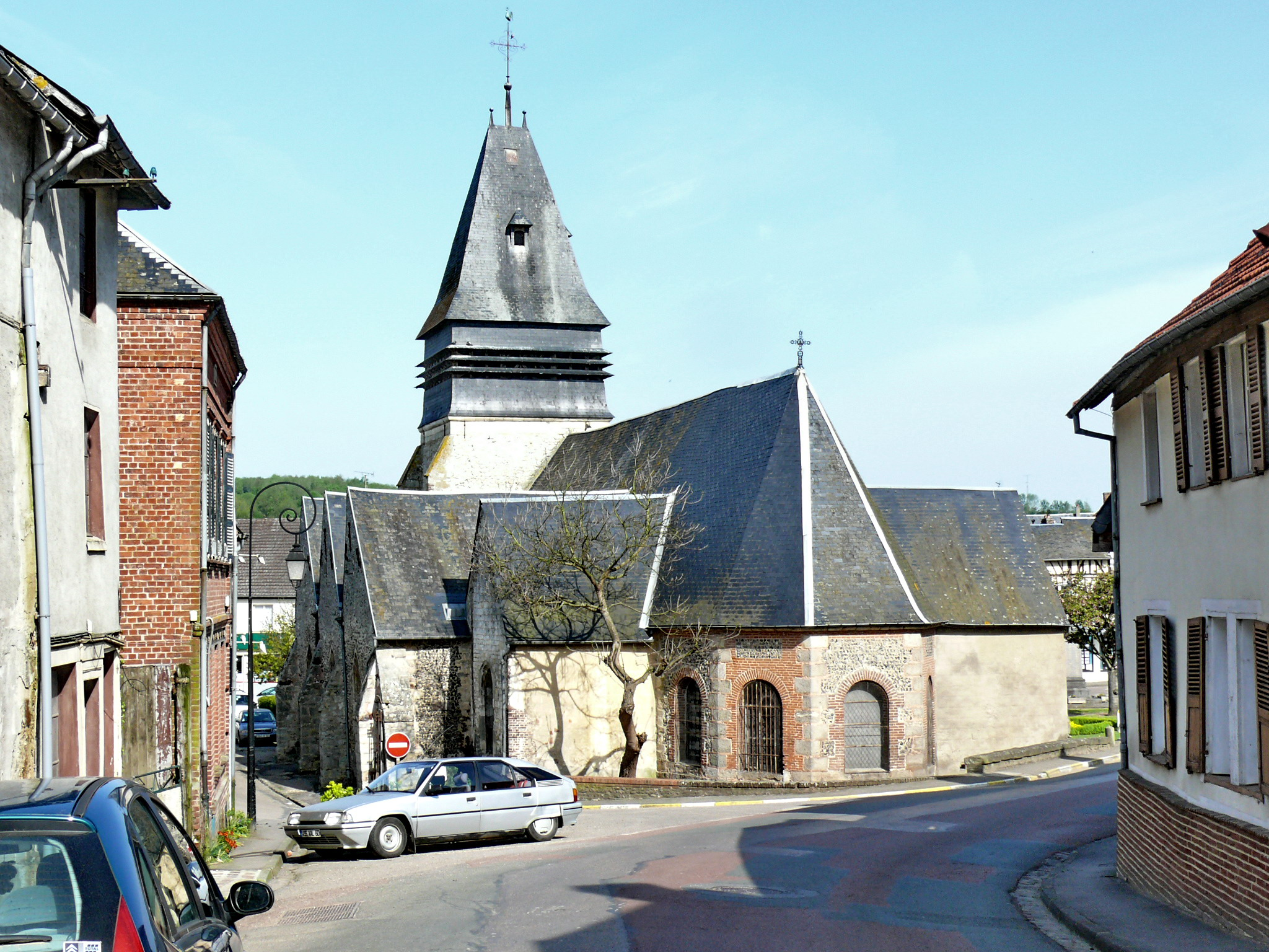 Chevet de l'église de Songeons (Oise, Picardie, France)